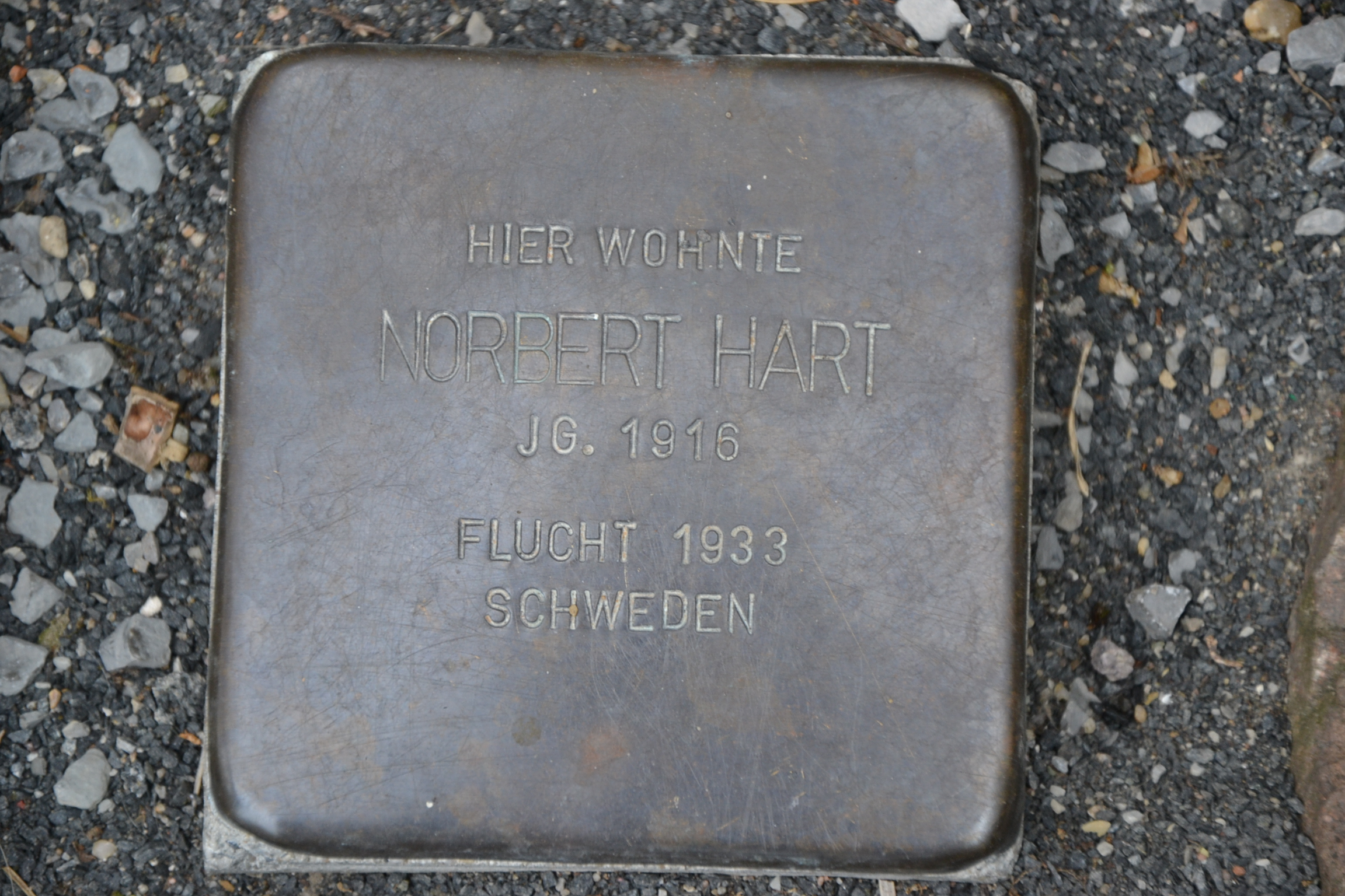 Stolperstein